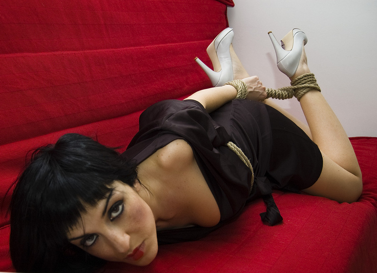 modella: dottoressadania foto e nodi miei